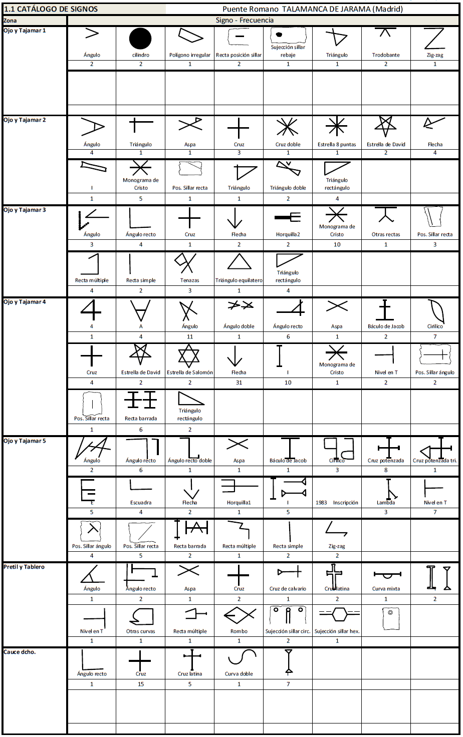 Puente Romano de Talamanca de Jarama, Madrid, España, s XI, XVI. Catálogo de Signos lapidarios.